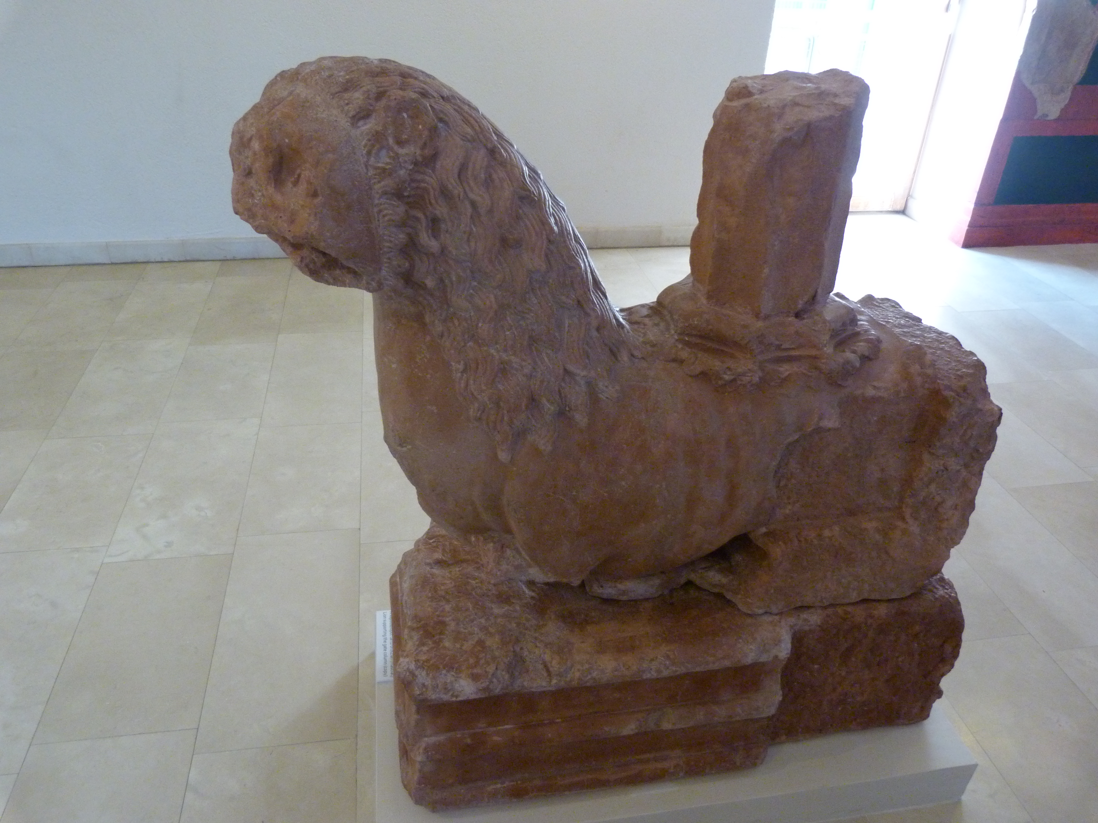 A felvétel 2015. április 22-én, szerdán készült Esztergomban. Királyi Vár. A helyreállított Királyi Várat 2015. április 18-án adták át a nagyközönségnek. Géza fejedelem székhelye Esztergom, a Várhegy. István király itt született, Esztergom érseki székhely is lett. A Szent Adalbert tiszteletére emelt székesegyházat 1010-ben említik először. III. Béla uralkodásának idején épült fel az új királyi lakosztály a kápolnával és a lakótoronnyal. 1241- 1242 telén a tatárok lerombolták a várost, de a várat Simon ispán és katonái meg tudták védeni. A helyreállított Királyi Várat 2015. április 18-án adták át a nagyközönségnek. Oroszlán (hiteles másolat). Források: Magyar Nemzeti Múzeum Esztergomi Vármúzeuma 2500 Esztergom, Szent István tér 1 szám. + 36 33 500135 Elkészült az Esztergomi Vármúzeum Magyar Nemzet online 2015 április 17A ©© Derzsi Elekes Andor, Budapest, 2015, A fénykép másolását és felhasználását a szerző ellenérték nélkül megengedi. Az engedély kiterjed a kereskedelmi célú hasznosításra is. Kéri azonban nevének feltüntetését a felhasználás során. A Metapolisz sorozat valamennyi képe és filmje Creative Commons alatti. kereskedelmi - for profit - célra is felhasználható. Ajánlott hivatkozás: Derzsi Elekes Andor: Metapolisz DVD line